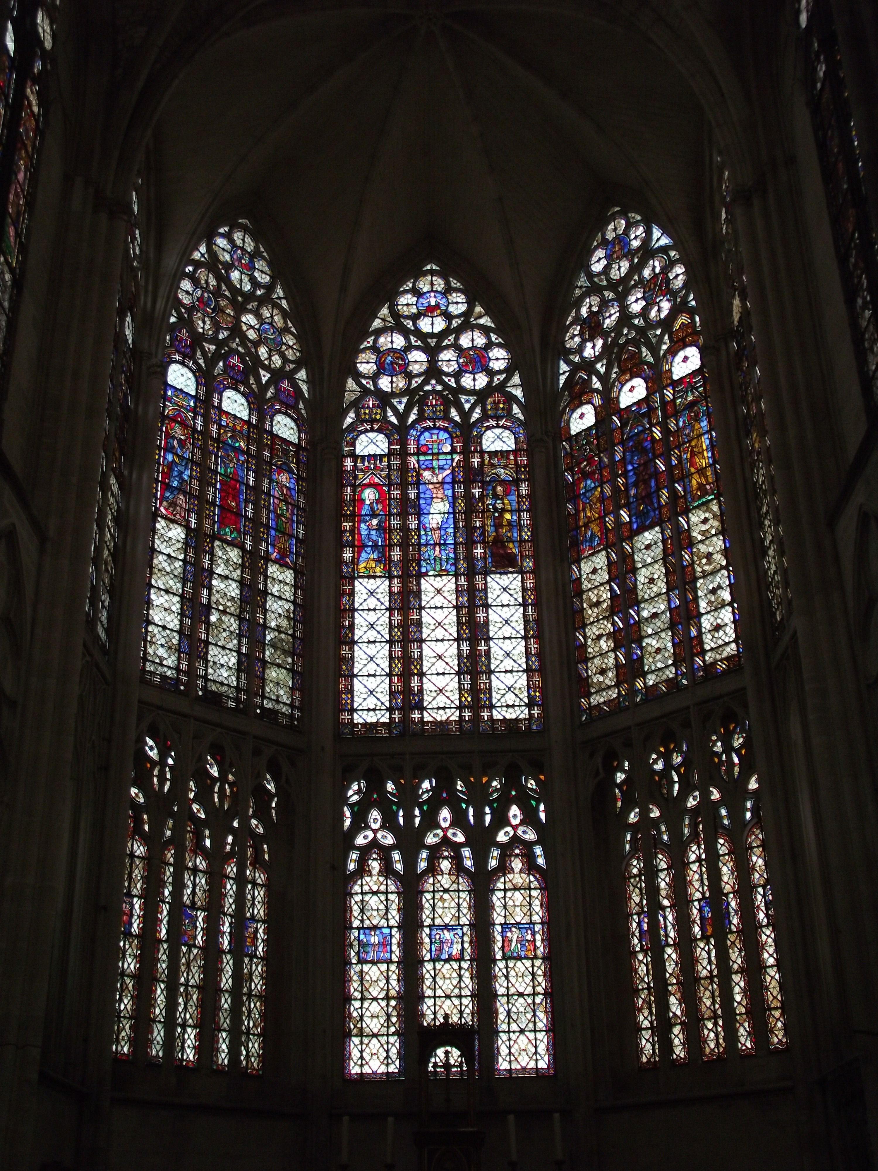 Troyes, Basilique Saint-Urbain, Vitreaux du choeur, 1270